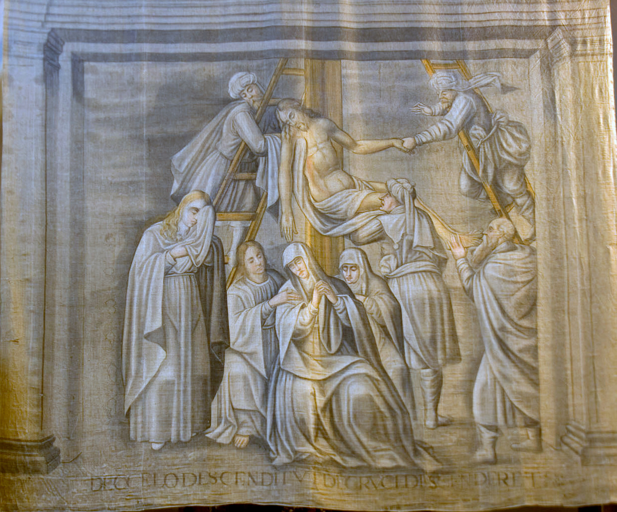 Descendimiento de la cruz, temple sobre sarga de anjeo, iglesia de la Santa Cruz, Garcillán (Segovia)